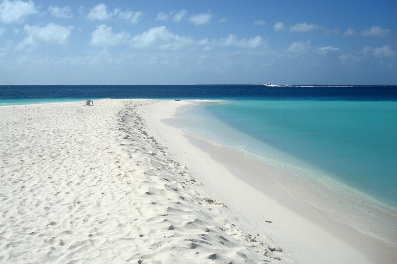 Madrisqui, Los Roques, Venezuela